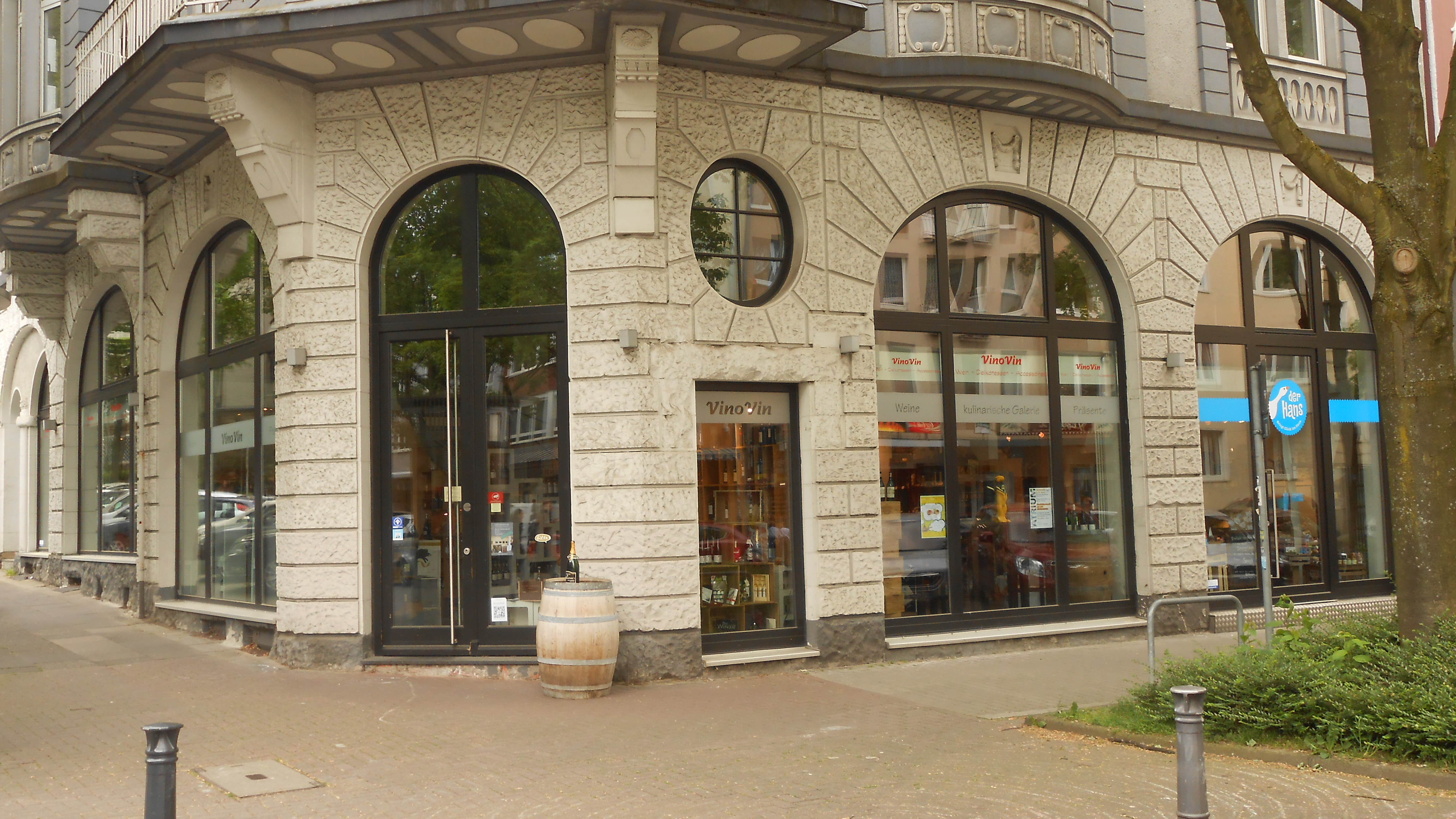 Das Weingeschäft VinoVin in der Kaiserstraße.